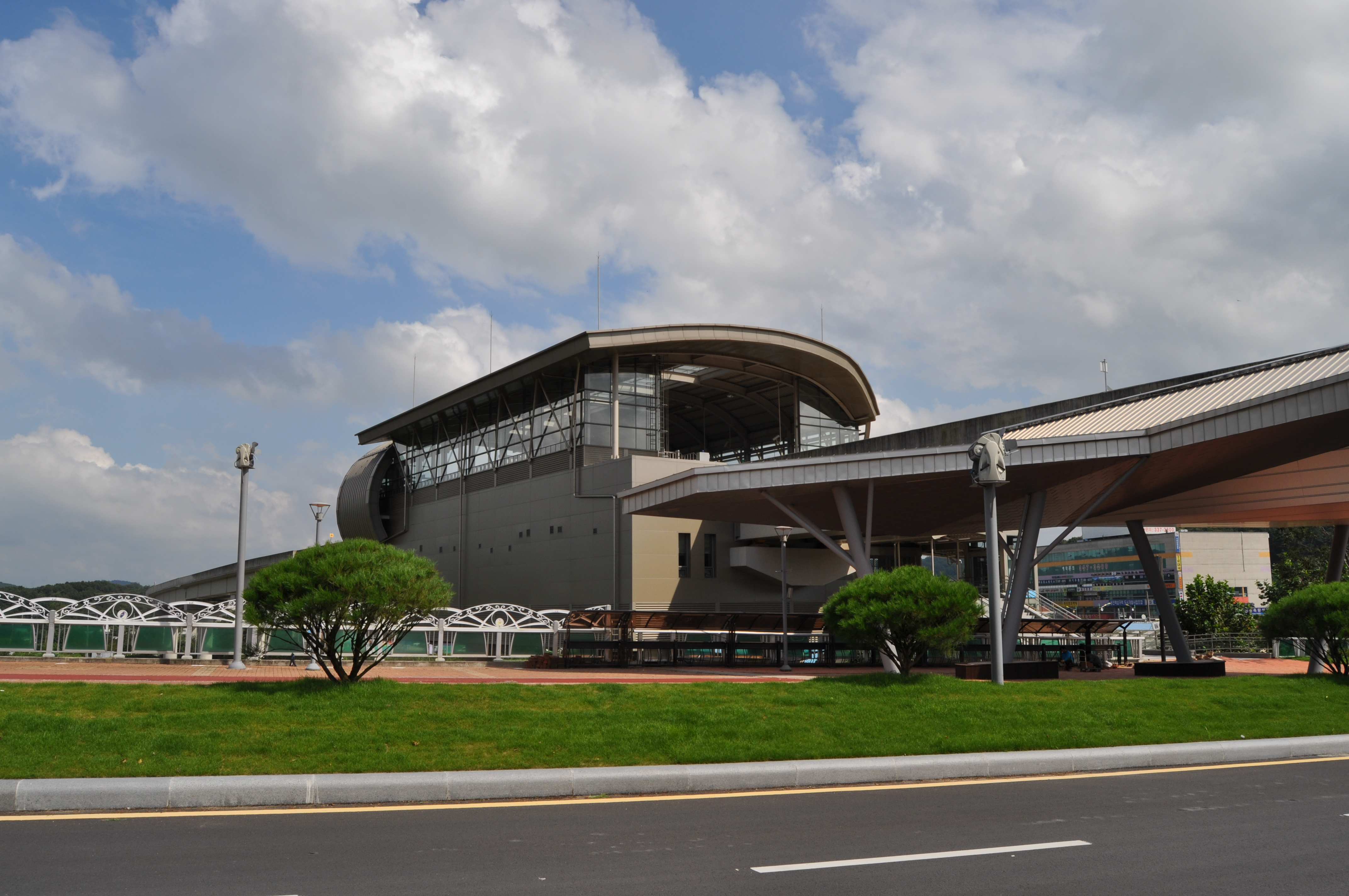 용인경전철 시청/용인대역